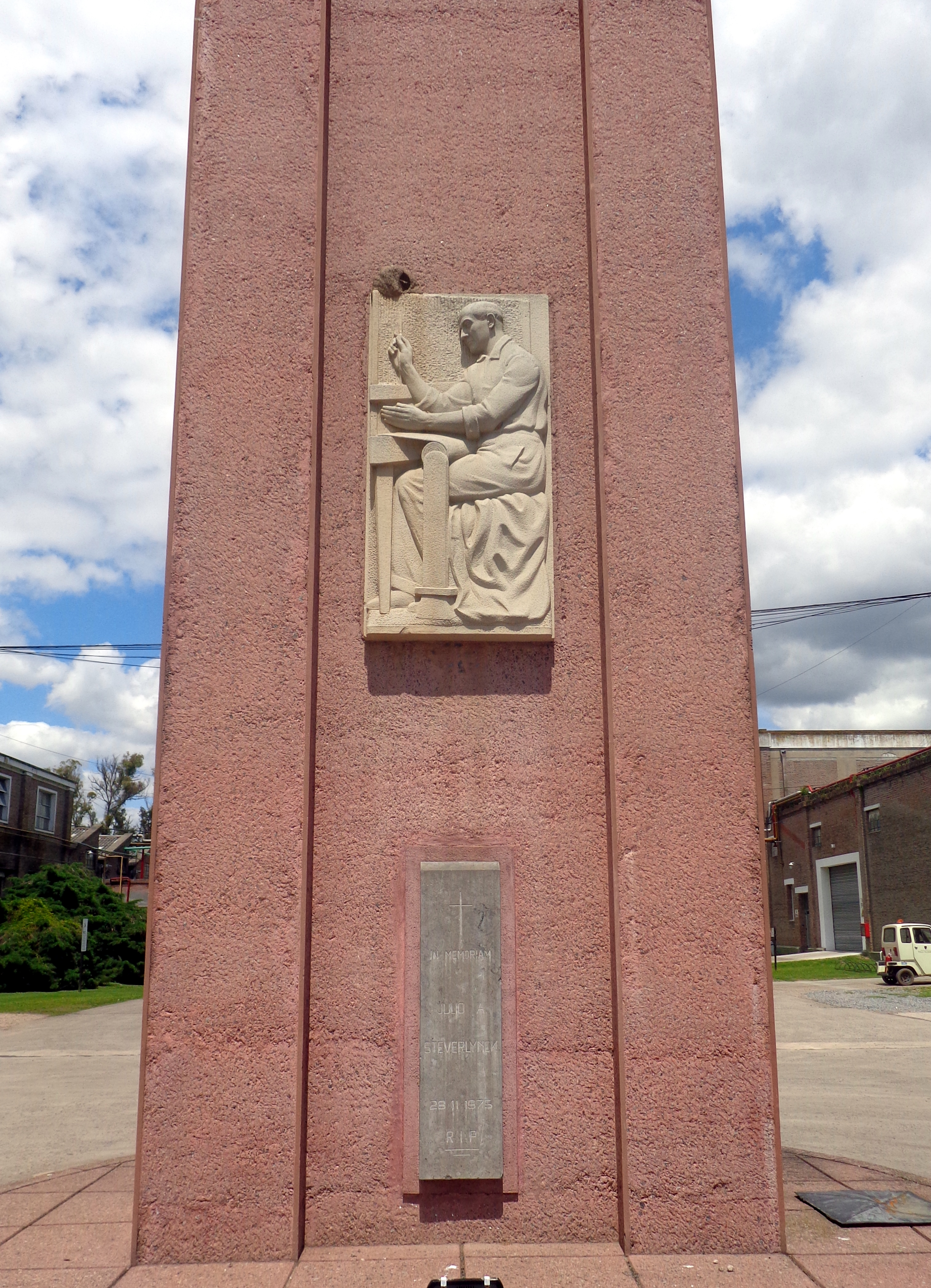 Monumento recordatorio a Julio Steverlynck, en Parque Indutrial Villa Flandria, en José María Jáuregui, partido de Luján, provincia de Buenos Aires, Argentina.